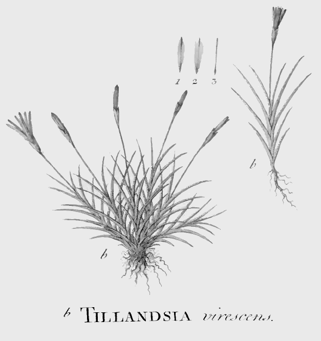 Tillandsia virescens Ruiz & Pav.